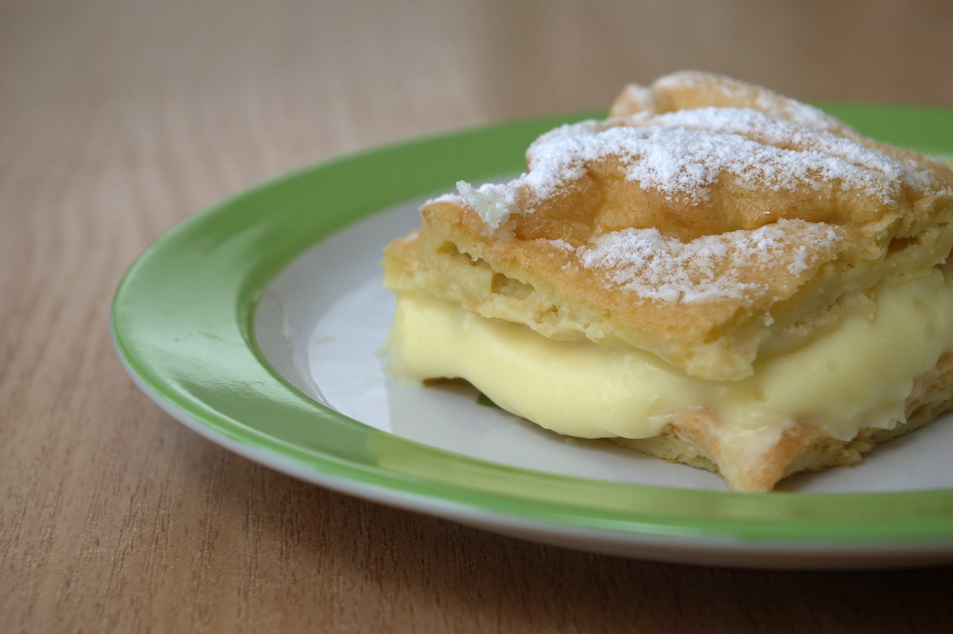 Karpatka, polish cake